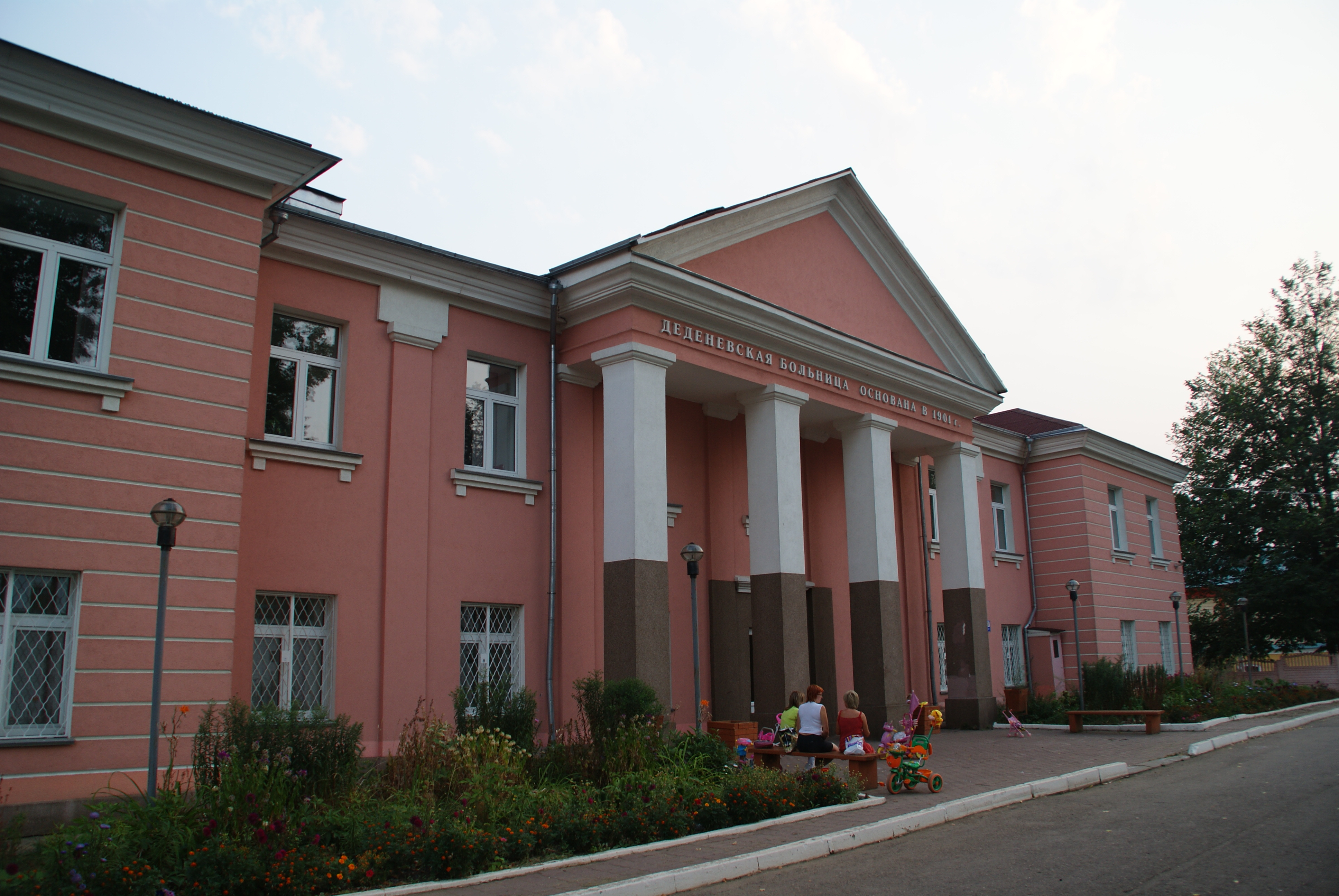 Больница в Деденево, постройка 1903 года